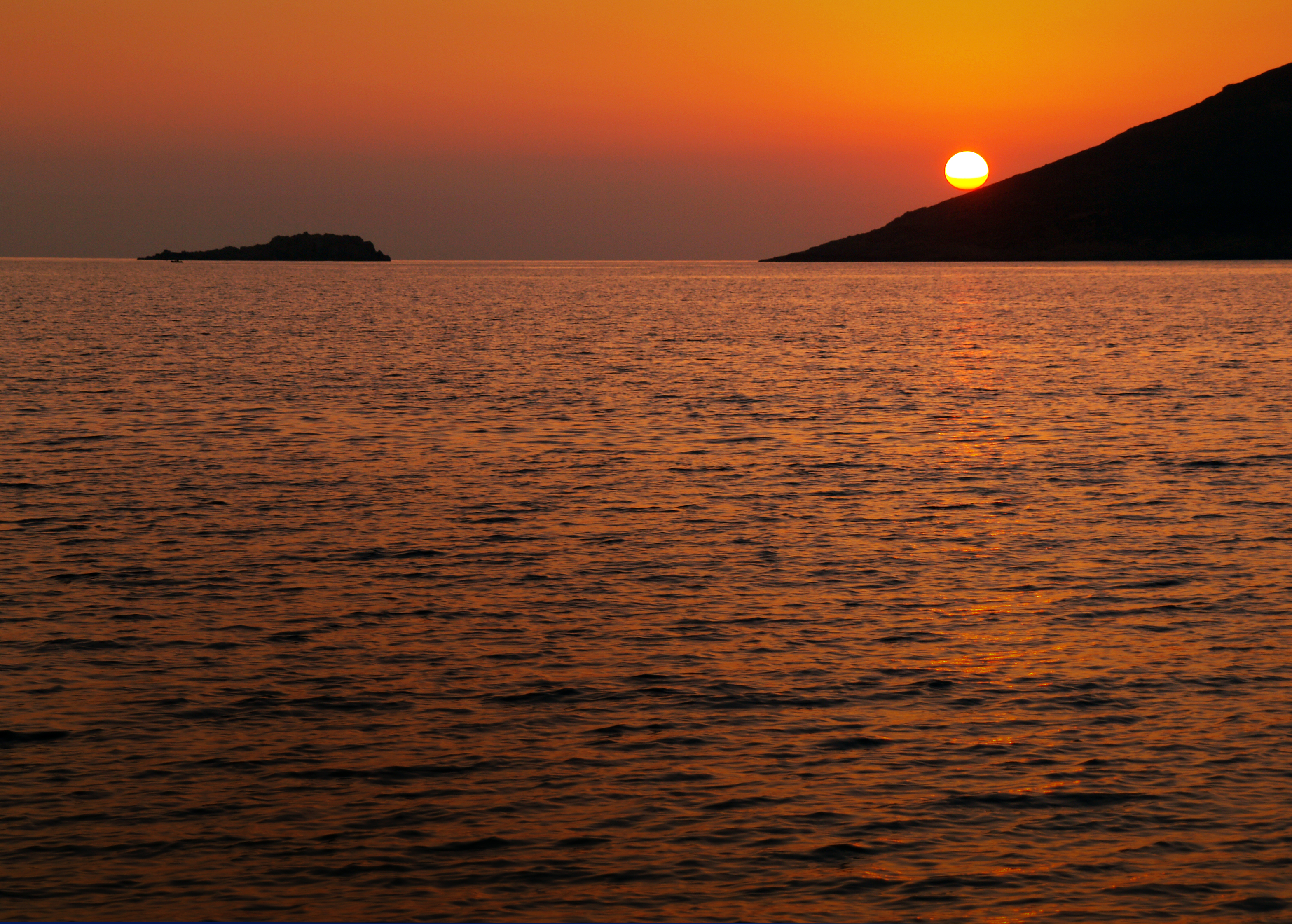 Calenzana (Corse) - Vue de l'Îlot sud de Mursetta depuis la plage de l'Argentella